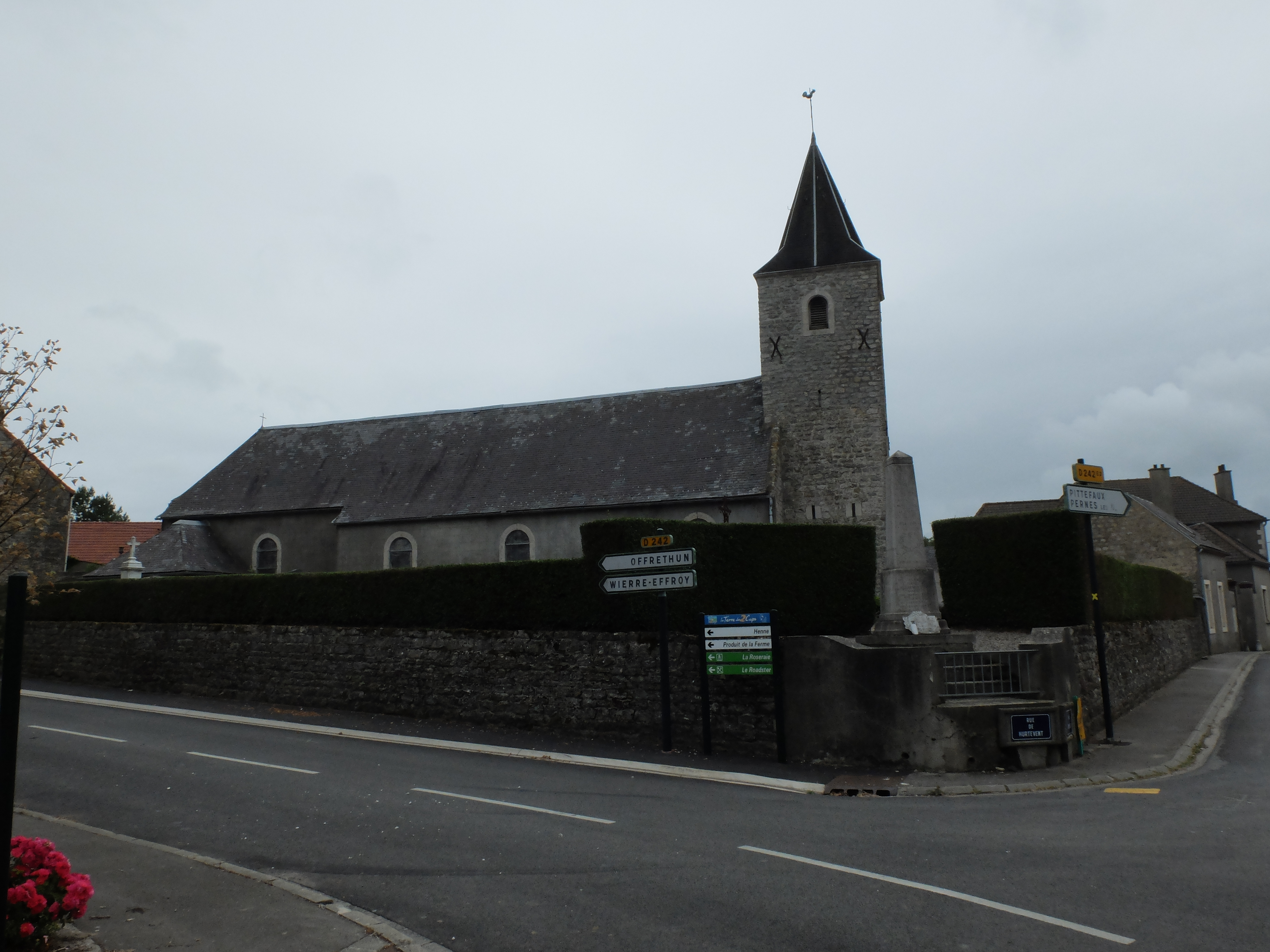 Vue de l'église Saint-Martin de Maninghen-Henne.